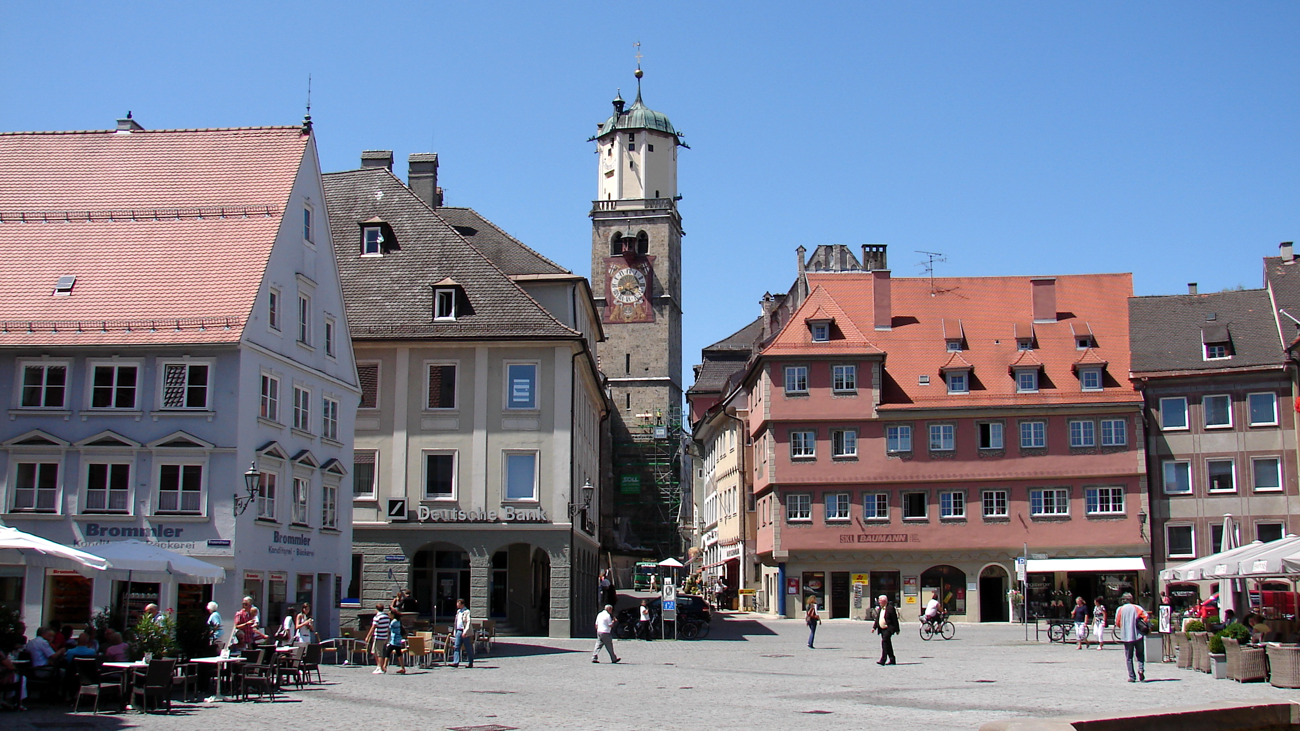 Die denkmalgeschützte Stadtpfarrkirche Sankt Martin in Memmingen ist eine der ältesten Kirchen Oberschwabens. Die Kirche ist ein Wahrzeichen der Stadt.